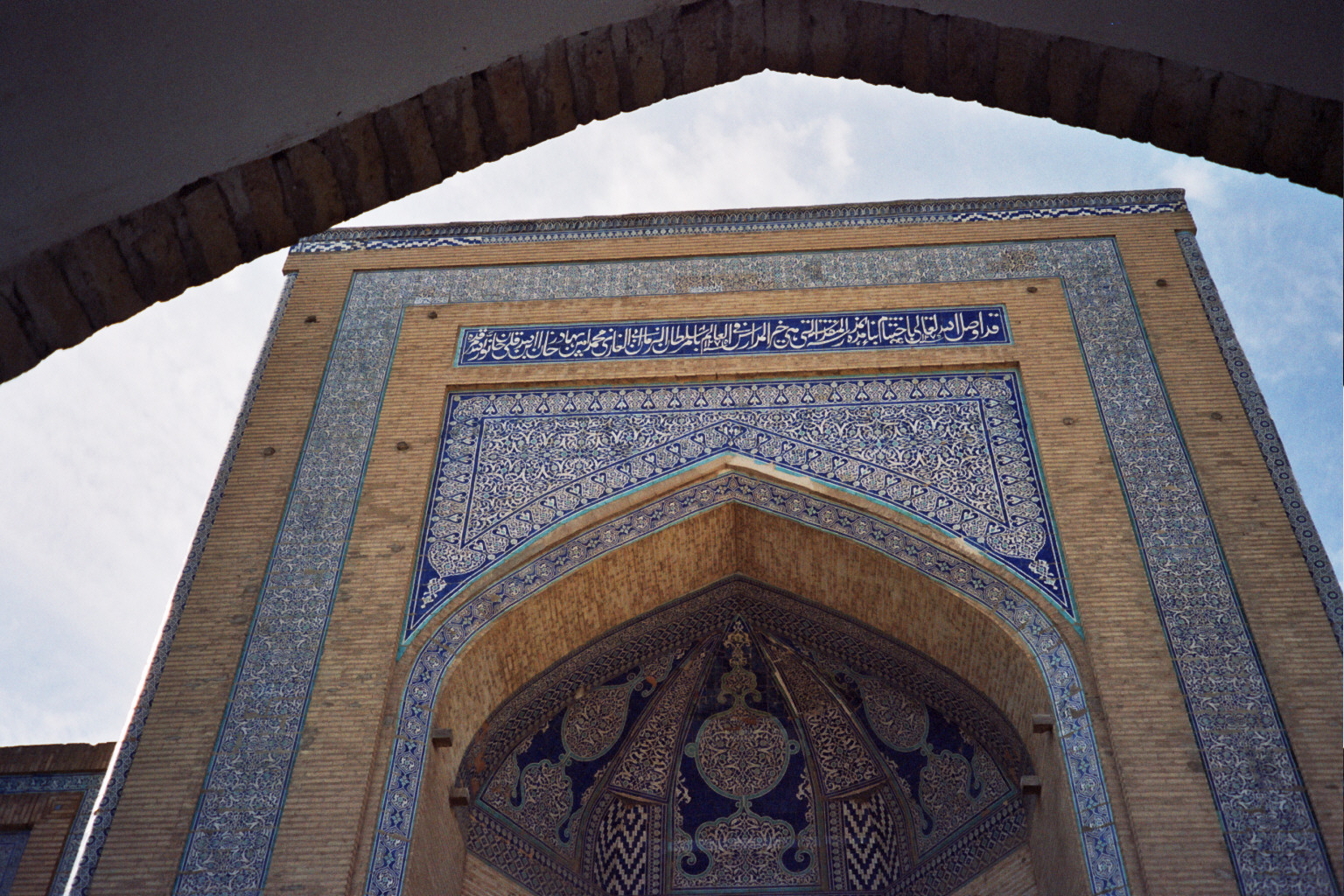 Muhammad-Amin-Khan Madrasa in Khiva, Uzbekistan